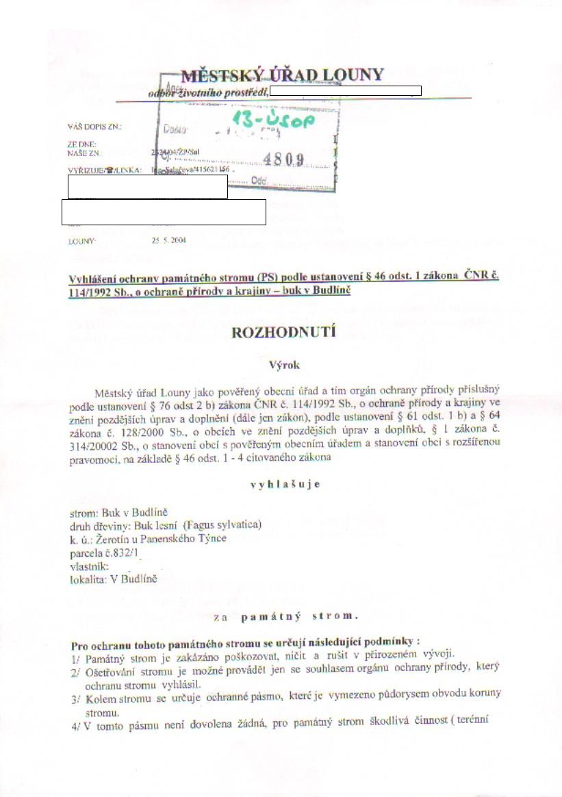 Rozhodnutí MěÚ Louny čj. 2324/04/ŽP/Sal (s vyretušovanými údaji) ze dne 25. 5. 2004 s účinností od 17. 6. 2004: Vyhlášení ochrany památného stromu Buk v Budlíně v lokalitě V Budlíně, Žerotín, okres Louny.